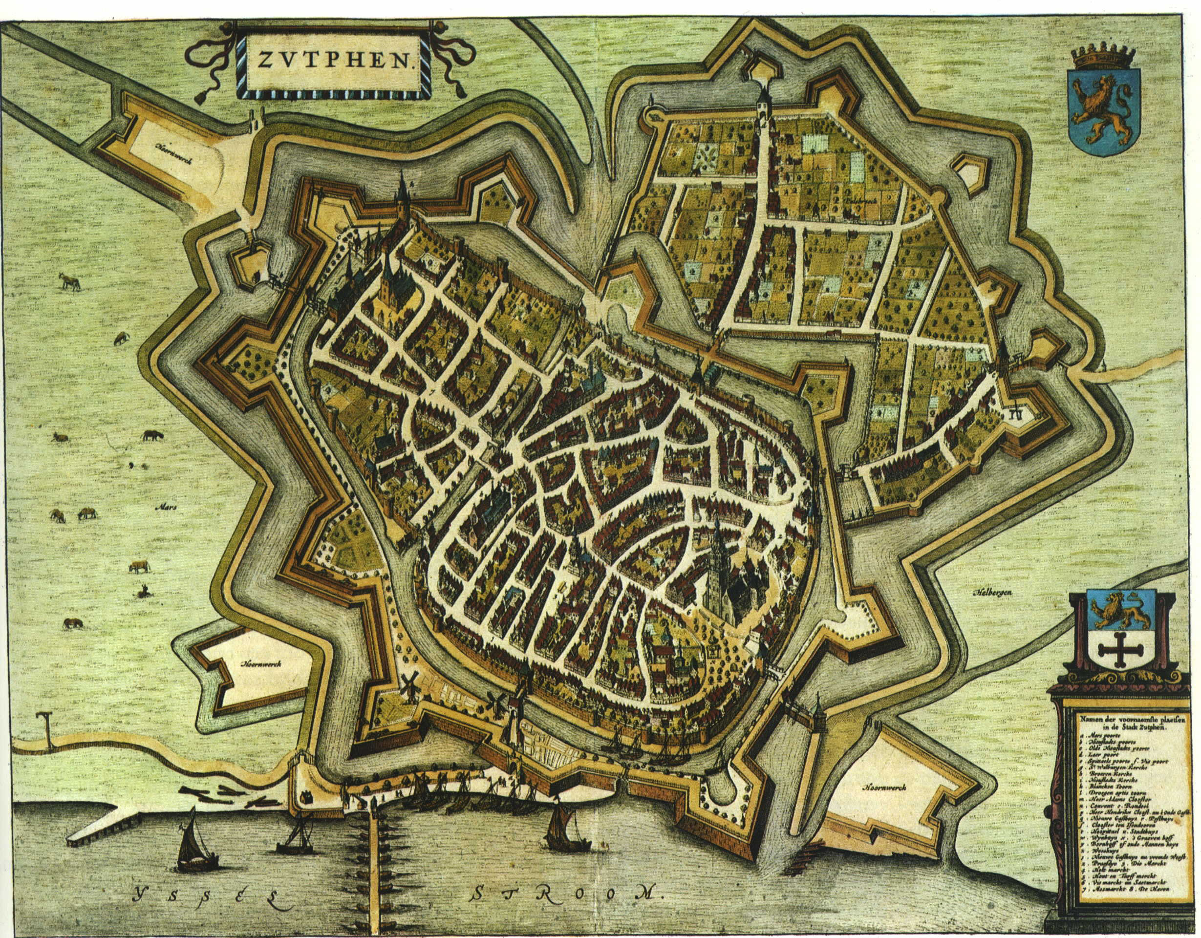 Historische handkolorierte Karte/Vogelschau der niederländischen Stadt Zutphen